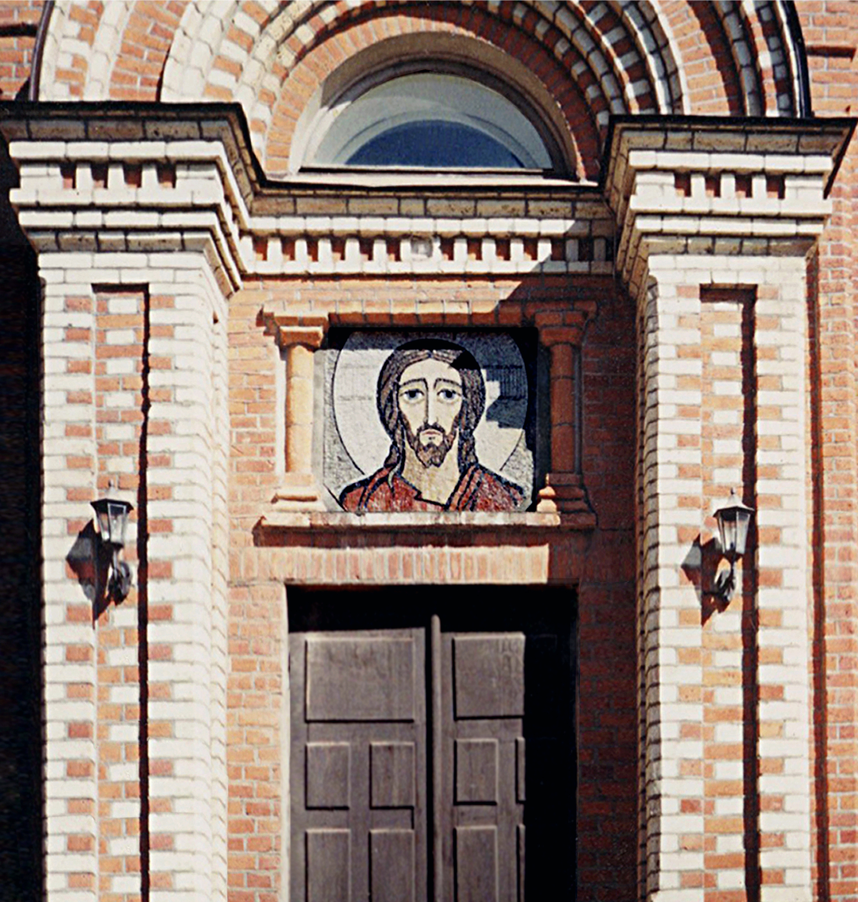 03 A. Matuliausko mozaika Kristus Marijampolės bažnyčios fasade, 1997.